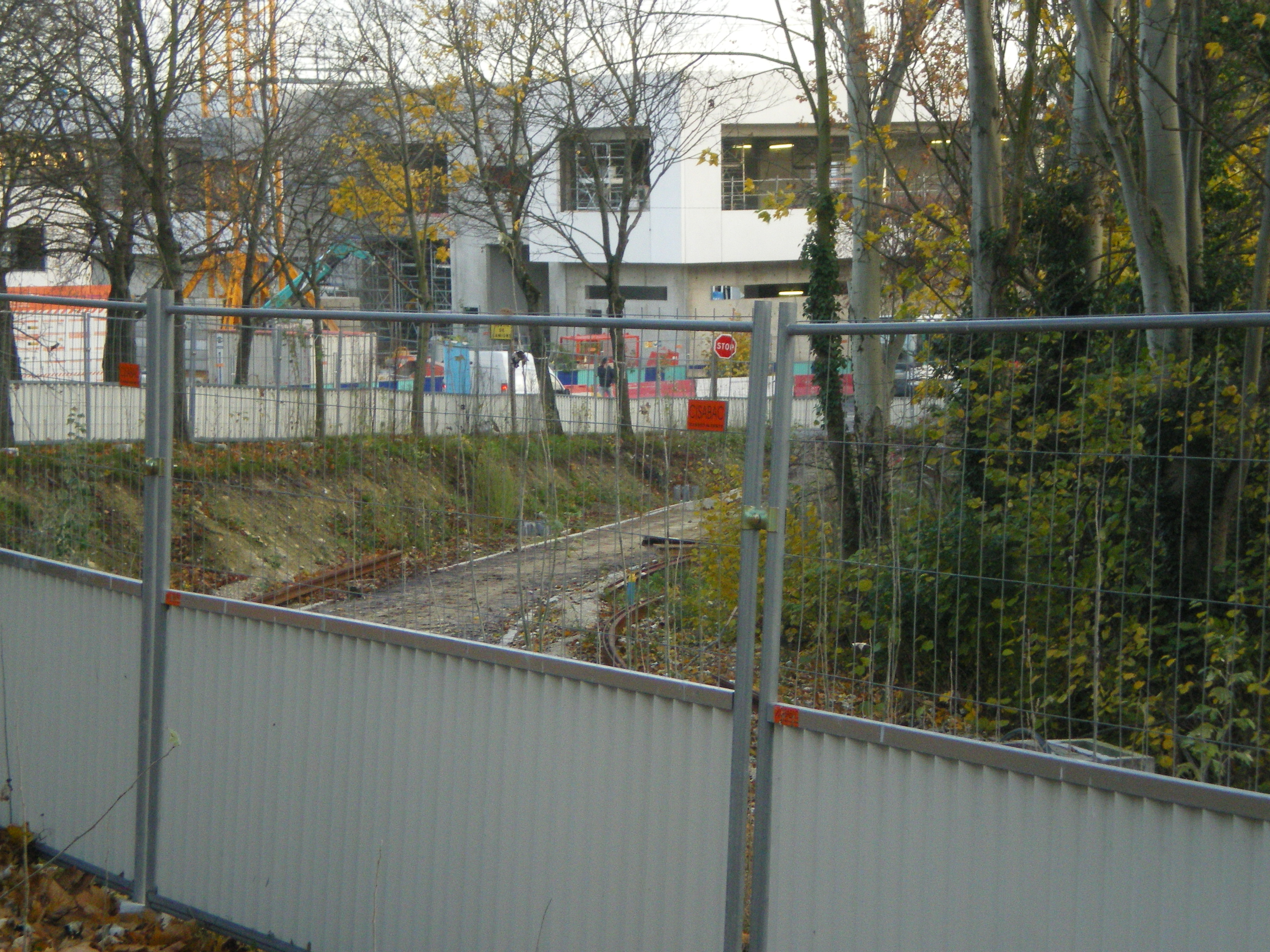 Chantier de la branche Villetaneuse du T8 - novembre 2012